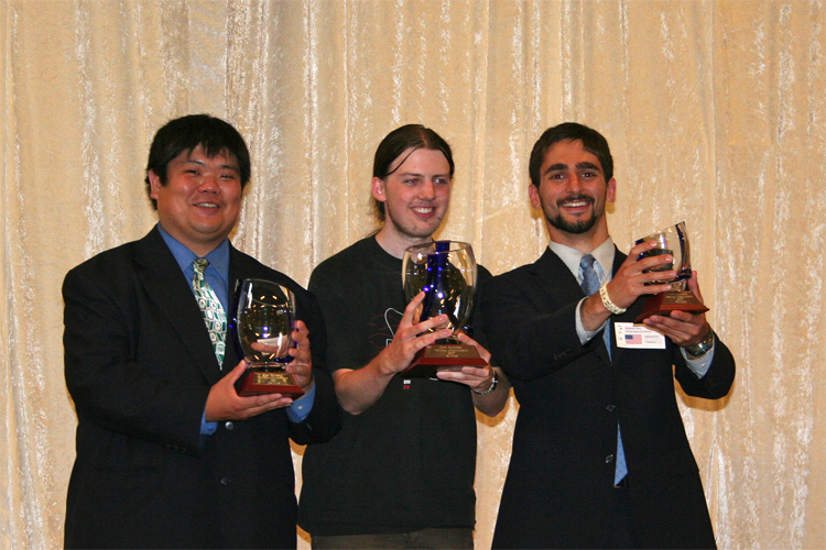 OEMC2007